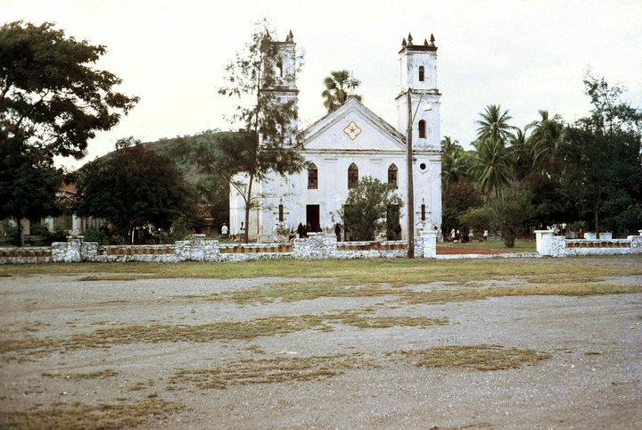 Esta igreja foi posteriormente recostruída